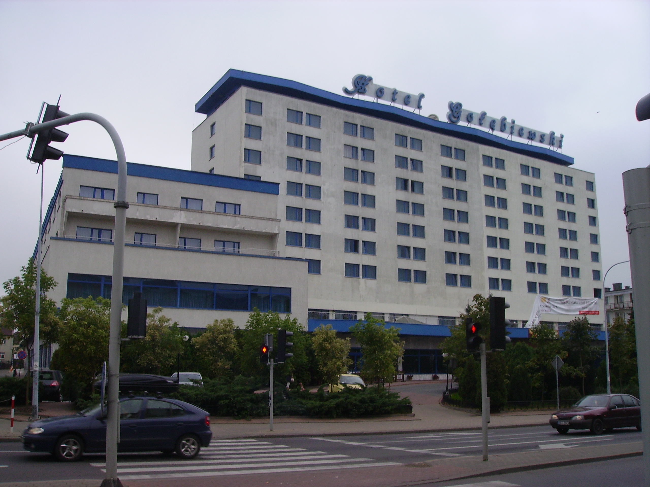 Hotel Gołębiewski - Białystok ul. Pałacowa 7